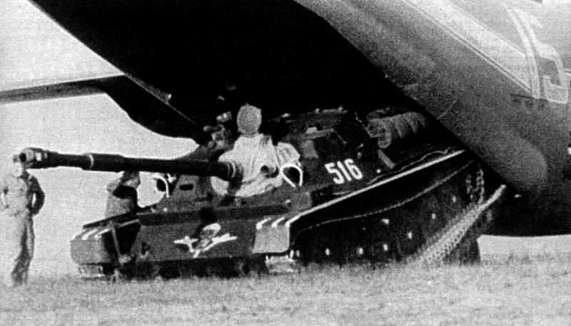 ASY-85-Landing: ASY-85-Landing with An-22